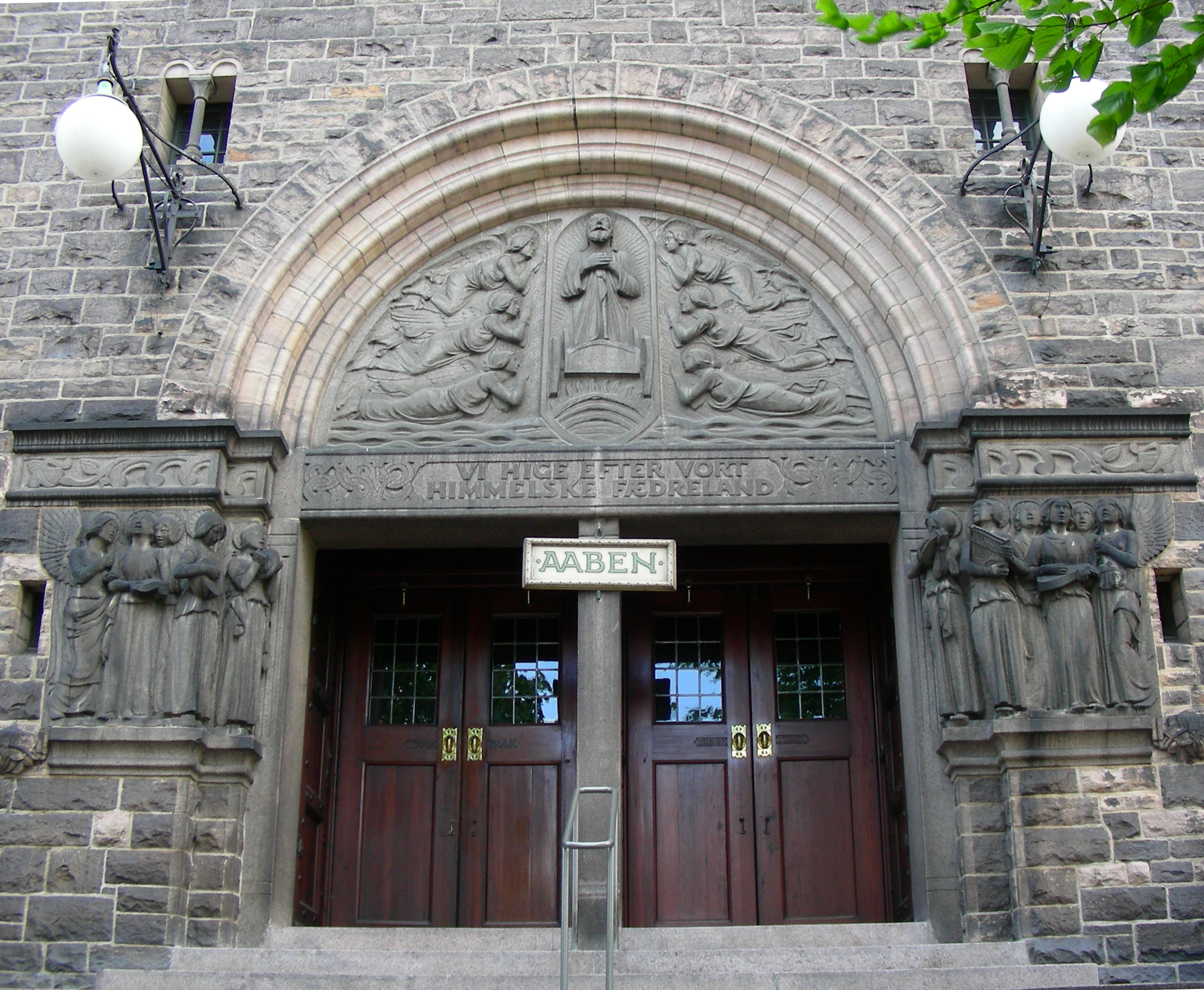 Elias Kirken in Copenhagen, Denmark. Entrance.